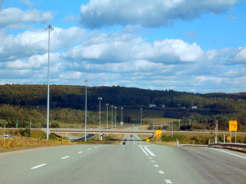 Autoroute Louis Bilodeau